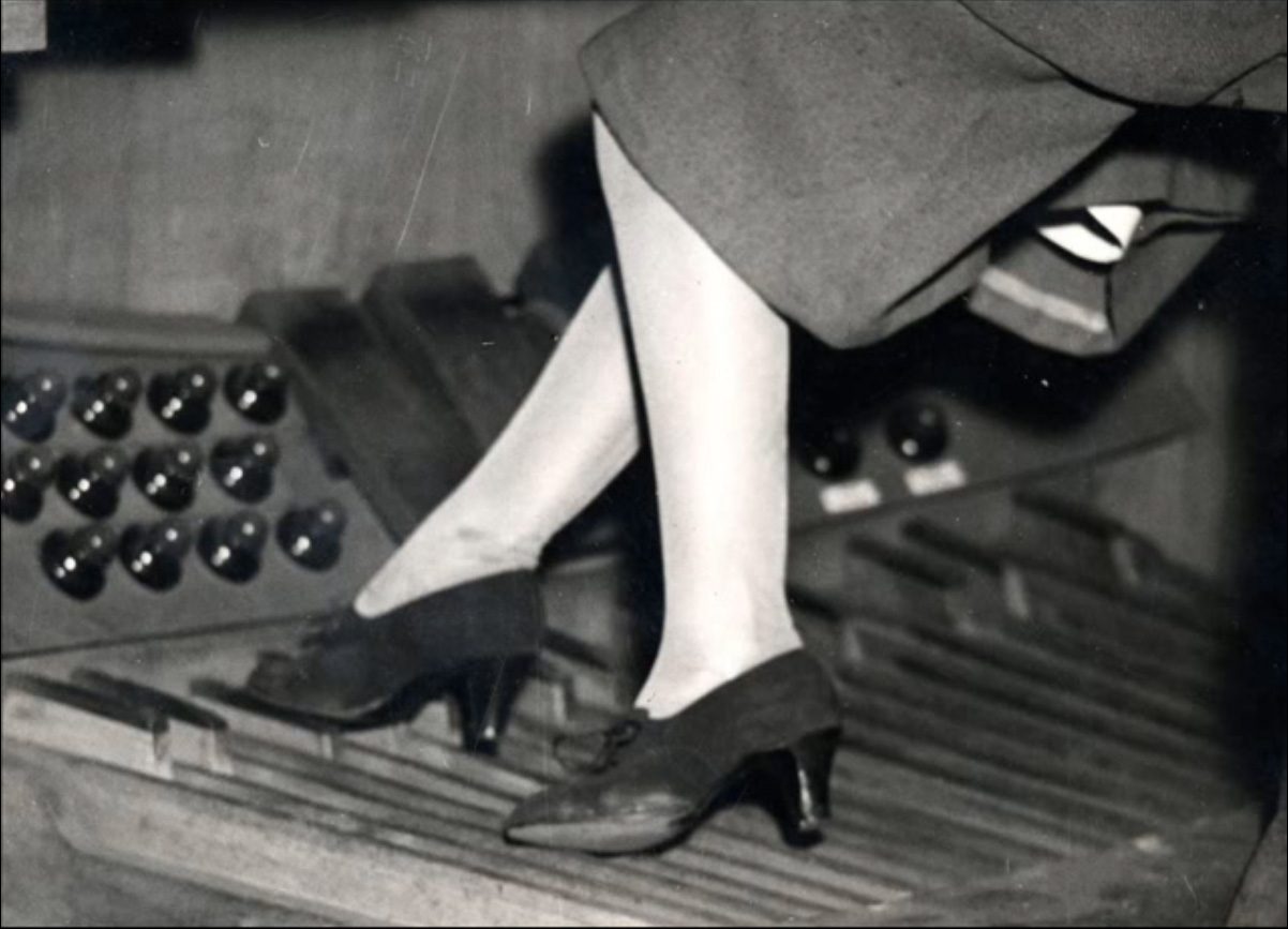 Jeanne Demessieux